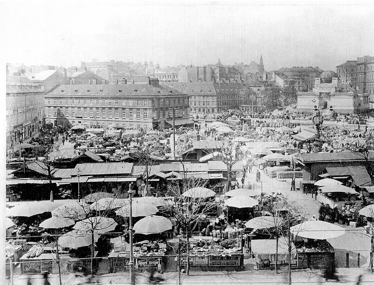 Der alte Wiener Naschmarkt vor 1895. Im Hintergrund, linksseitig des noch nicht überdachten Wienflusses, die Secession.